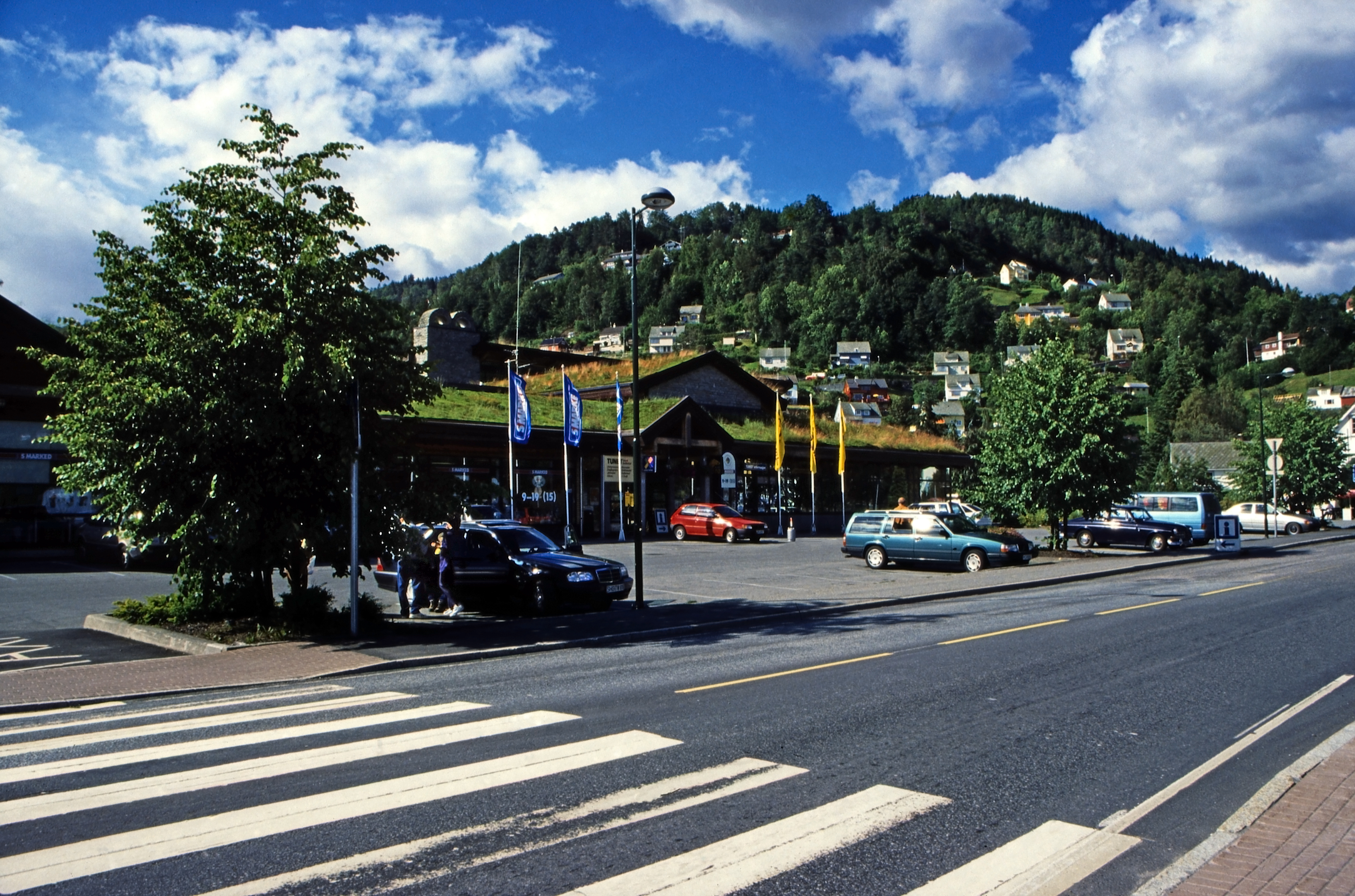 Auf der Fahrt von Geilo nach Bergen in Øystese am Hardangerfjord